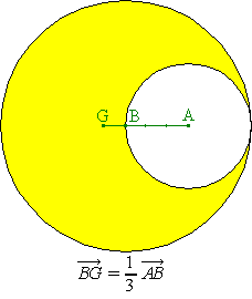 Figura realizada por M.Romero Schmidkte ✉, especialmente para la Enciclopedia Libre y para la Wikipedia.